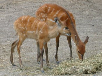 Sitatunga